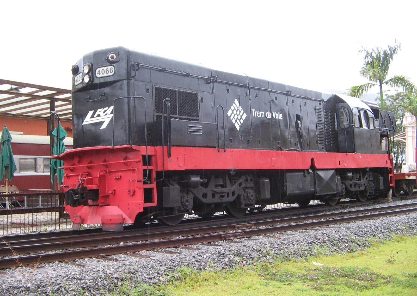 EFOM / FCA EMD G8 nº4066 - Mariana-MG-Brasil